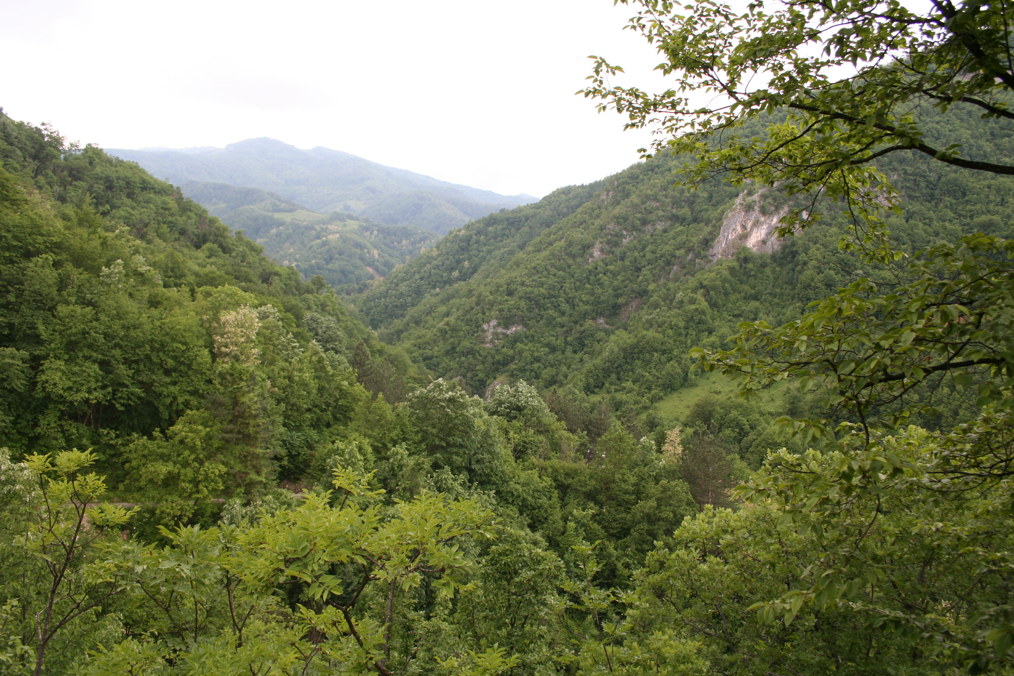 Manastir Pustinja